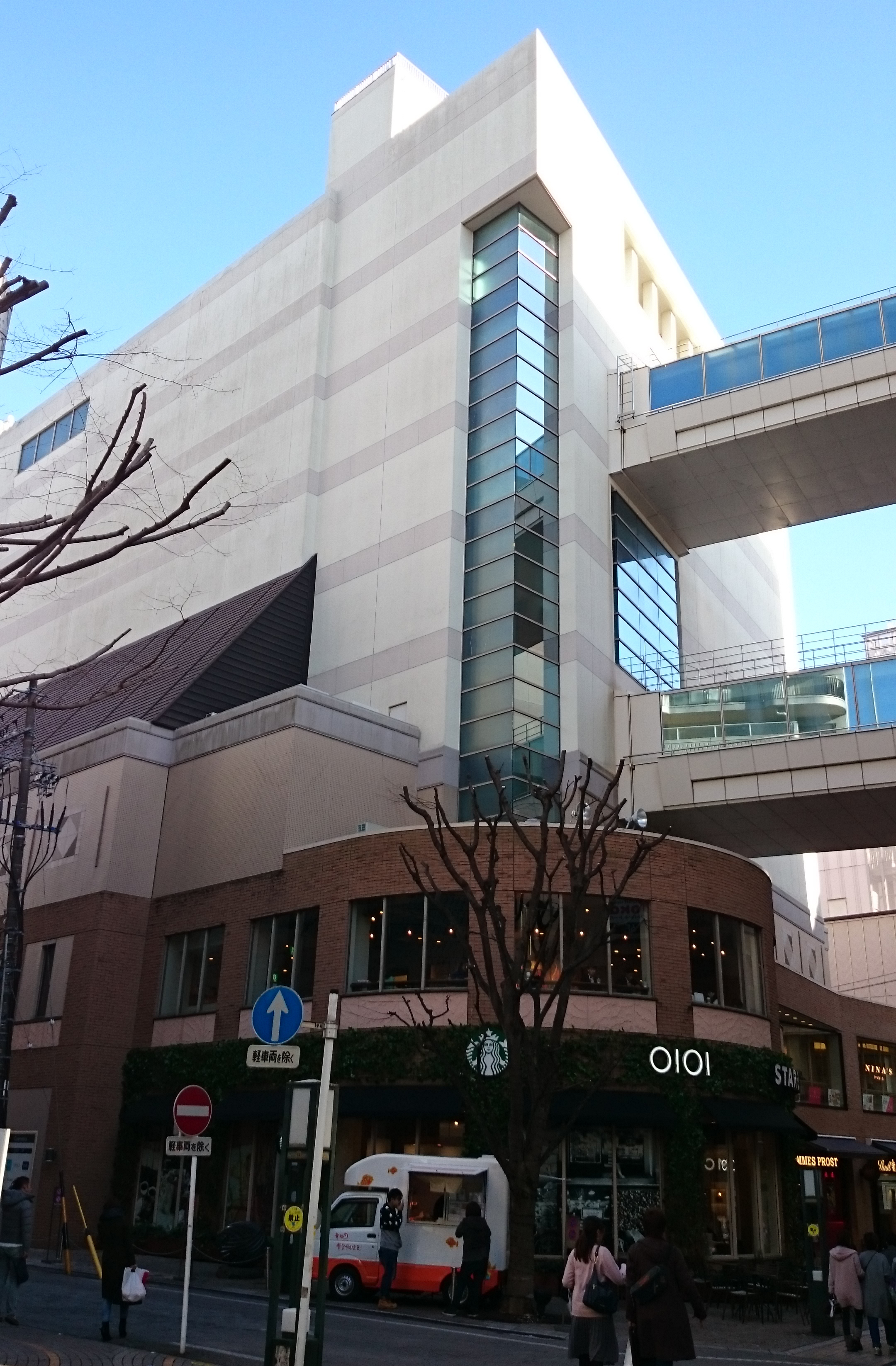 静岡マルイ（旧丸井静岡店A館）を2017年1月30日に撮影